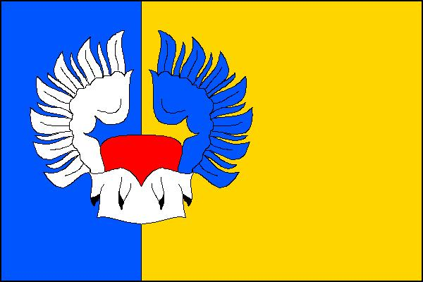 Vlajka obce Malíč